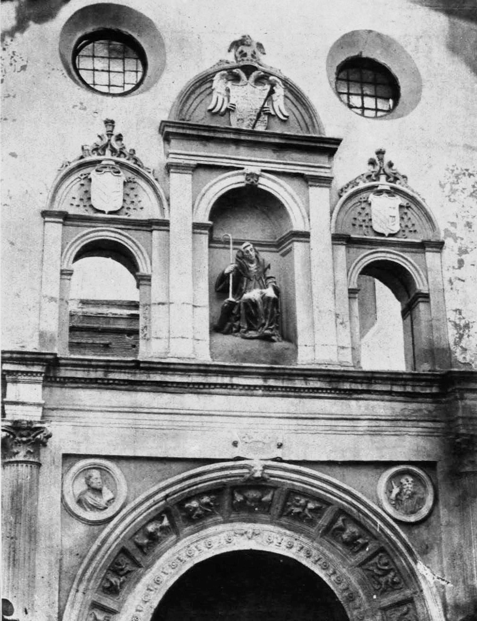 Detalle de la portada de la desaparecida iglesia de san Gil en Granada.